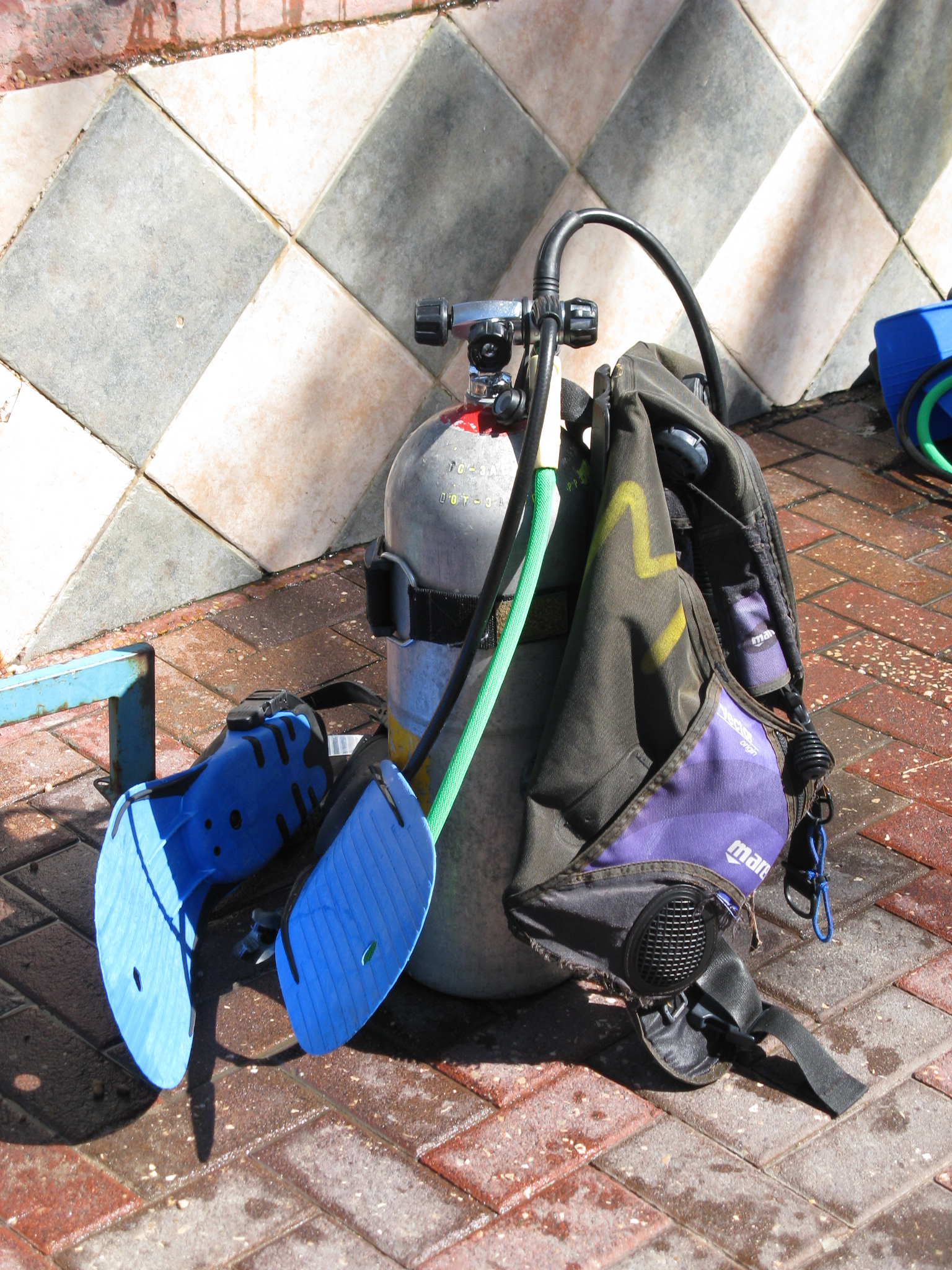 ציוד צלילה מוכן לצלילה